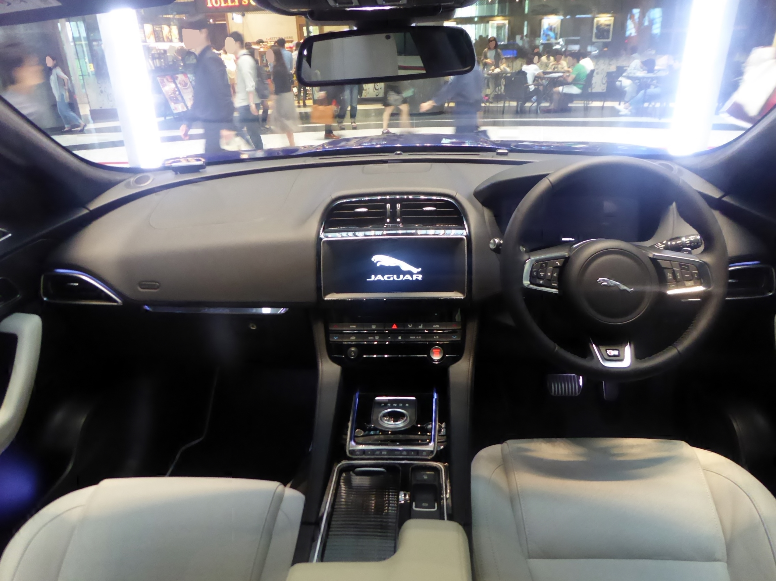 ジャガー・FペースSのインテリアを撮影。